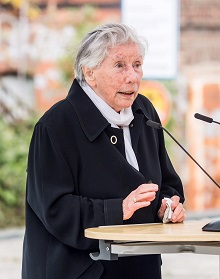 Vera Friedländer spricht am Mahnmal Gleis 17 des Bahnhofs Grunewald